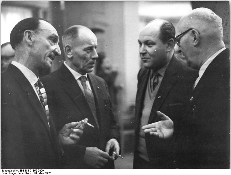 Zentralbild-Junge 28.3.1962 Volkskammer der DDR berät Volkswirtschaftsplan und Staatshaushaltsplan 1962 - Dr. Lothar Bolz gibt aussenpolitische Erklärung ab Die Volkskammer der Deutschen Demokratischen Republik trat am 28.3.1962 zu ihrer 22. Sitzung zusammen. Zu Beginn gab der Minister für Auswärtige Angelegenheiten, Dr. Lothar Bolz, eine Erklärung zu aussenpolitischen Fragen ab. Im Mittelpunkt der Volkskammersitzung stehen die erste und zweite Lesung des Beschlusses der Volkskammer über den Volkswirtschaftsplan 1962 und des Gesetztes über den Staatshaushaltsplan 1962. UBz.: In einer Sitzungspause unterhalten sich die Abgeordneten (v.l.n.r.): Paul Kurzawa, stellvertetender Betriebsleiter im BKW Greifenhain (SED), Held der Arbeit Franz Striemann, Weberei-Technologe in der Tuchfabrik Cottbus (FDG); Joachim Winkler, BGL-Vorsitzender im Leuna-Werk "Walter Ulbricht" (FDGB), und Wilhelm Neumann (FDGB).